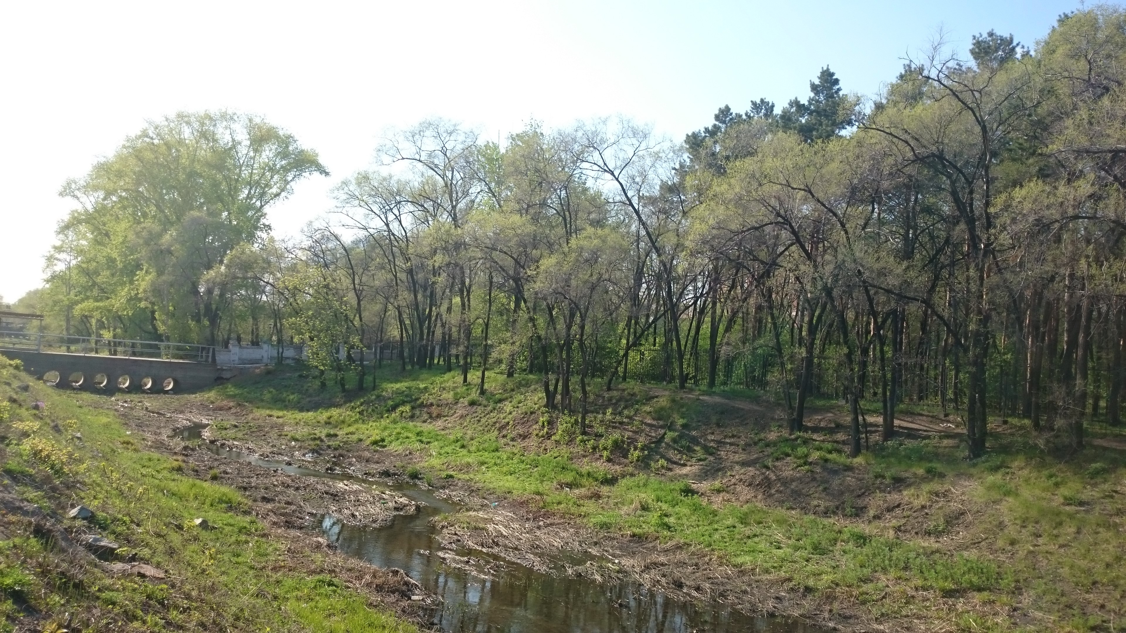 Зеленая роща, Благовещенск, май 2015г. This image is related to the protected area of Russia number 2820035